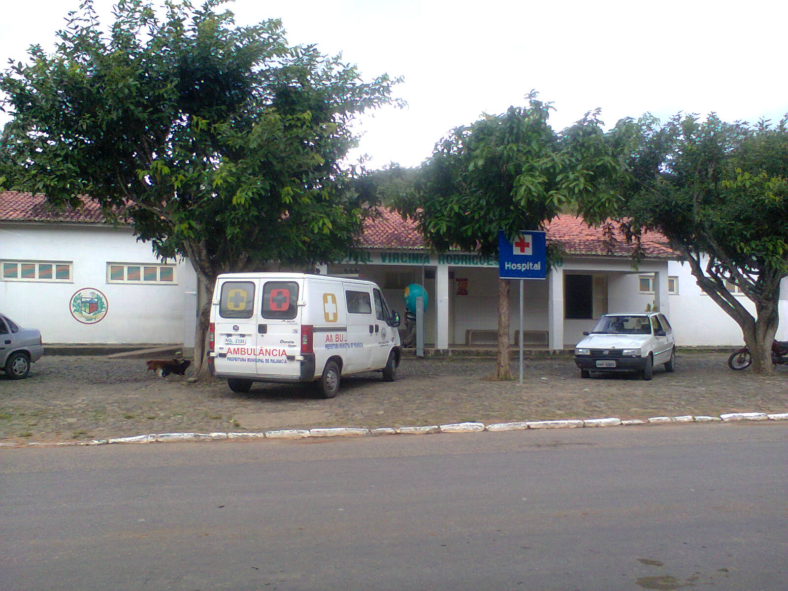 Hospital Municipal de Palmácia